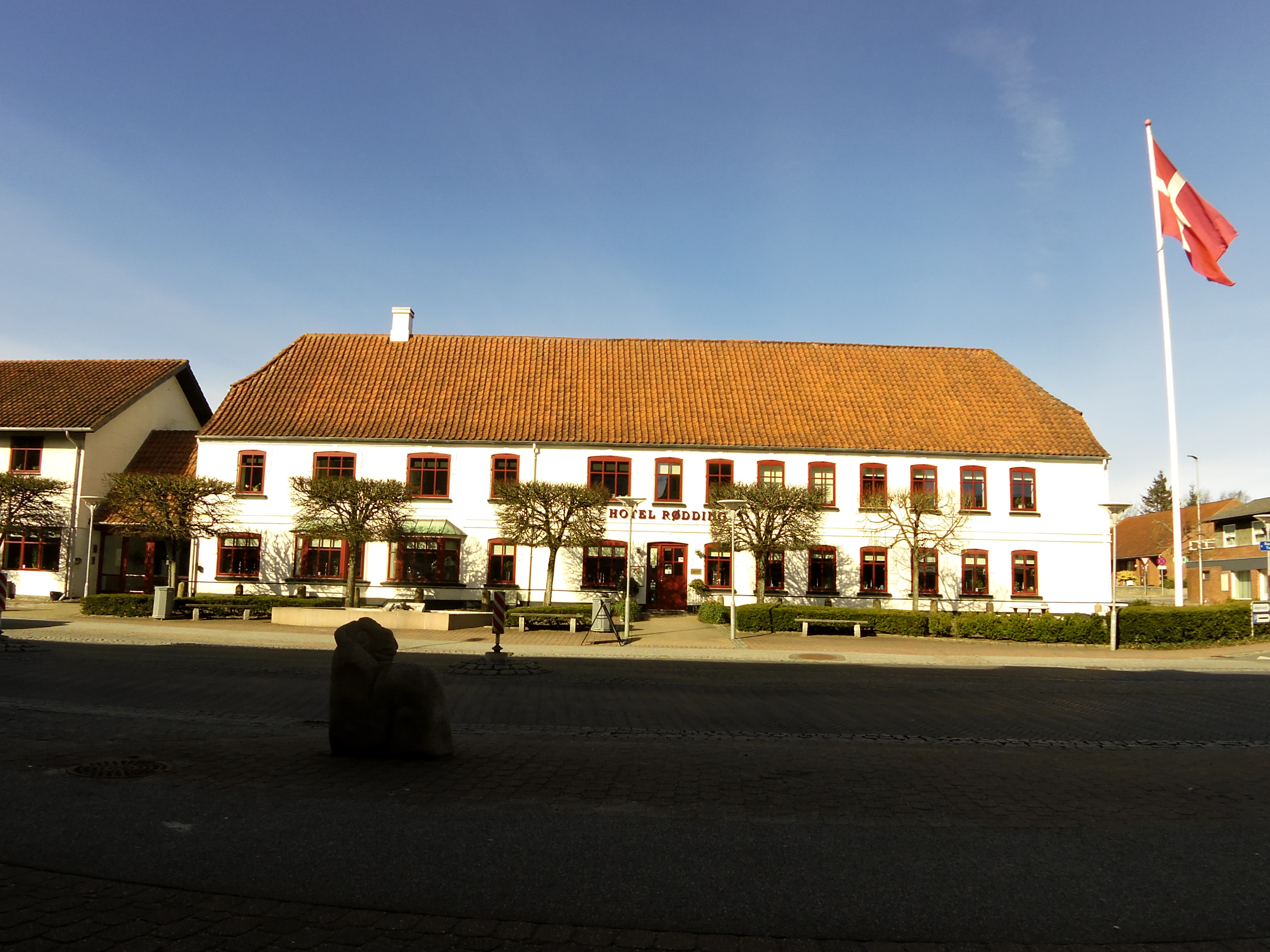 Hotel Røddings hovedbygning